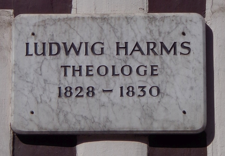 Göttinger Gedenktafel für Ludwig Harms (Kurze-Geismar-Straße 30)